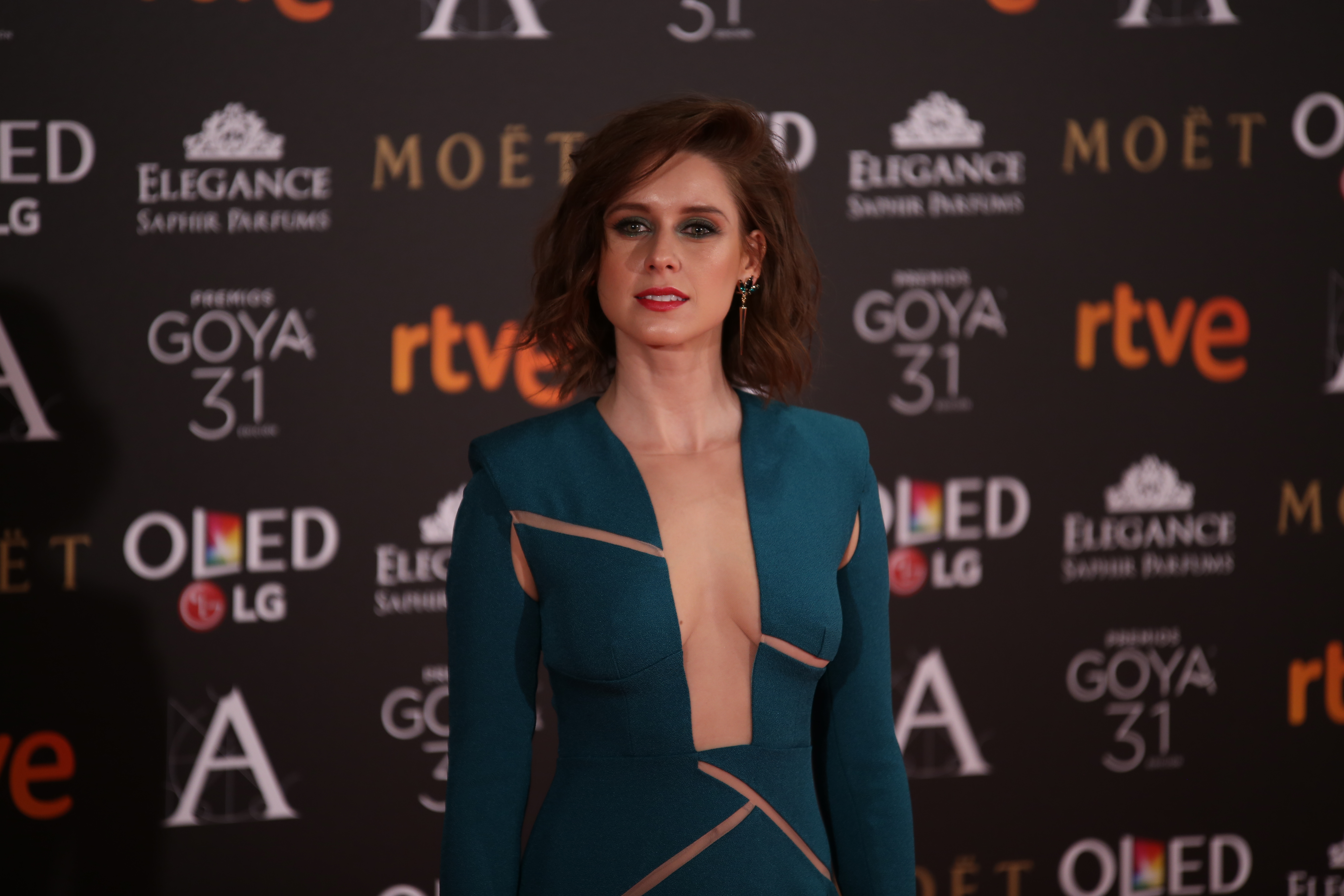 Premios Goya 2017